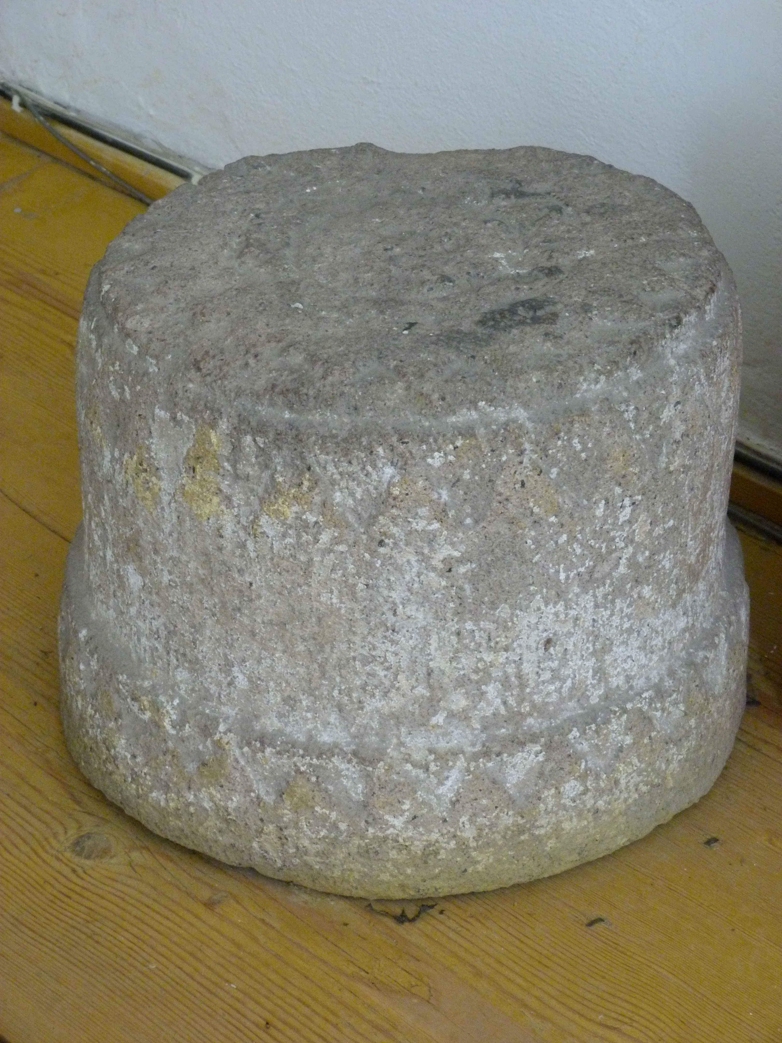 A felvétel 2013. június 19 –én készült Csíksomlyón. Somlyó hegyén találták a Napköveket, melyek a magyar ősvallás oltárai. A felvétel a Ferences Kolostor első emeletén készült. Daczó Lukács Árpád csíksomlyói ferences szerzetest 1957-ben a csíksomlyói kegytemplom igazgatójává nevezték ki. A templomot ő díszítette varrottasokkal, rakottas szőnyegekkel és felcsíki fekete kerámiával. Véleménye szerint “ A napkő a legnagyobb tárgyi bizonyítéka annak, hogy Csíksomlyó volt a Kárpát-medencében a napkultusz központja.” Csíkszereda: Pallas Akadémia Könyvkiadó, 56. o (2010). ISBN 978-973-665-303-2. Vécsey Gyula gyűjtéséből származik az az adat, mely szerint a két csíksomlyói Nap-követ az asszonyok régen „tiszta kendővel éppúgy megérintették, mint most a Mária szoborral teszik” ... Boldogasszony kapcsolata a napoltárkövekkel nyilvánvaló. ©© Derzsi Elekes Andor, Budapest, 2013, You are authorised to use these photos and vids under Creative Commons – even for commercial, for profit purposes. Photos must be attributed to Derzsi Elekes Andor. All of the photos and vids in the Metapolisz DVD line are under Creative Commons and can be used even for commercial – for profit – purposes. Recommended Citation Derzsi Elekes Andor: Metapolisz DVD line